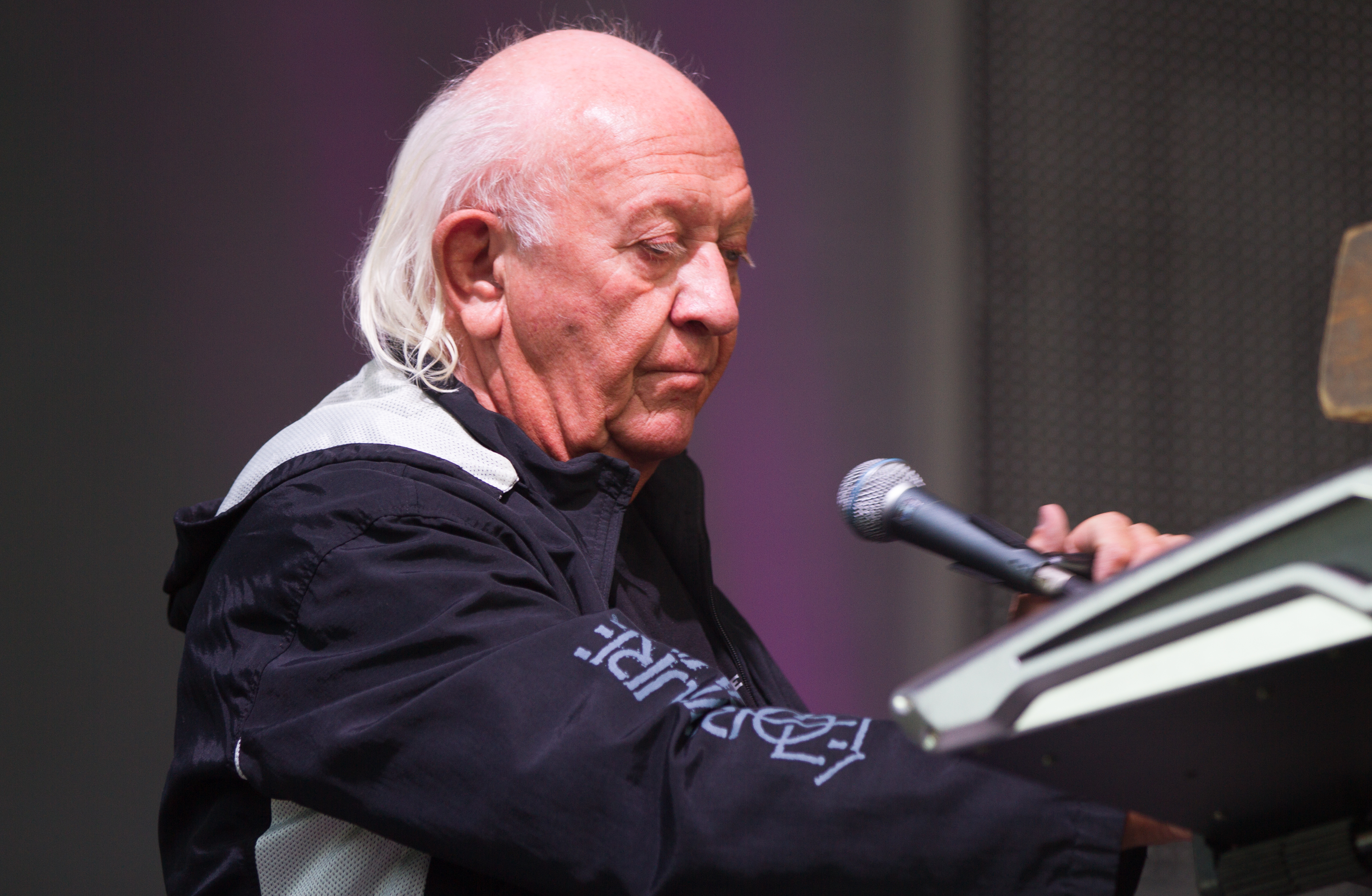 Peter „Eingehängt“ Meyer beim "Puhdys - Das große Abschiedskonzert 2015" in der Kindl-Bühne Wuhlheide